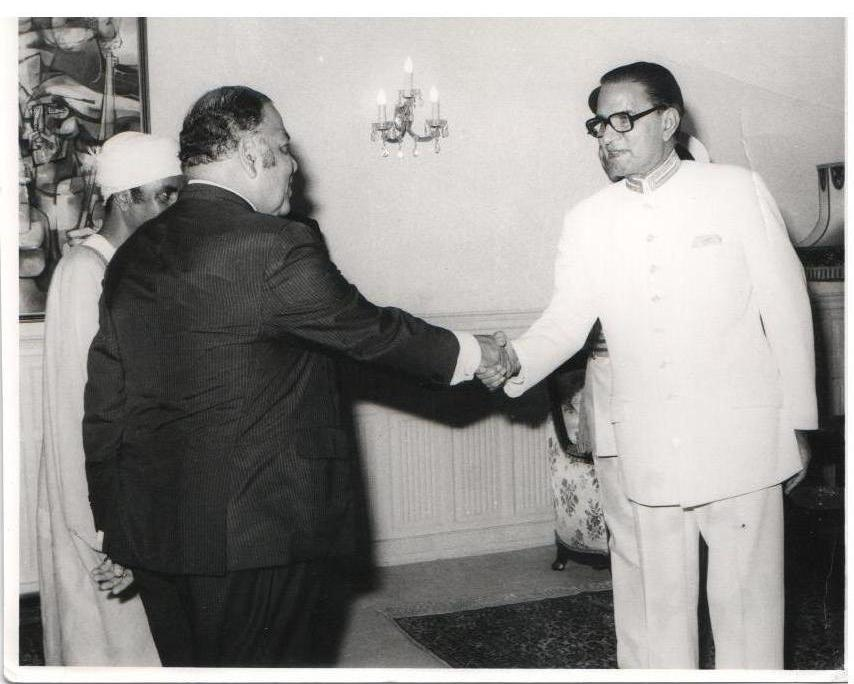 عمر شرف يستقبله رئيس باكستان فضل إلهي شودري. President of Pakistan Fazal Ilahi Chaudhry receiving Mr. Omar Sharaf, Presidential Palace, Rawalpindi,1975.